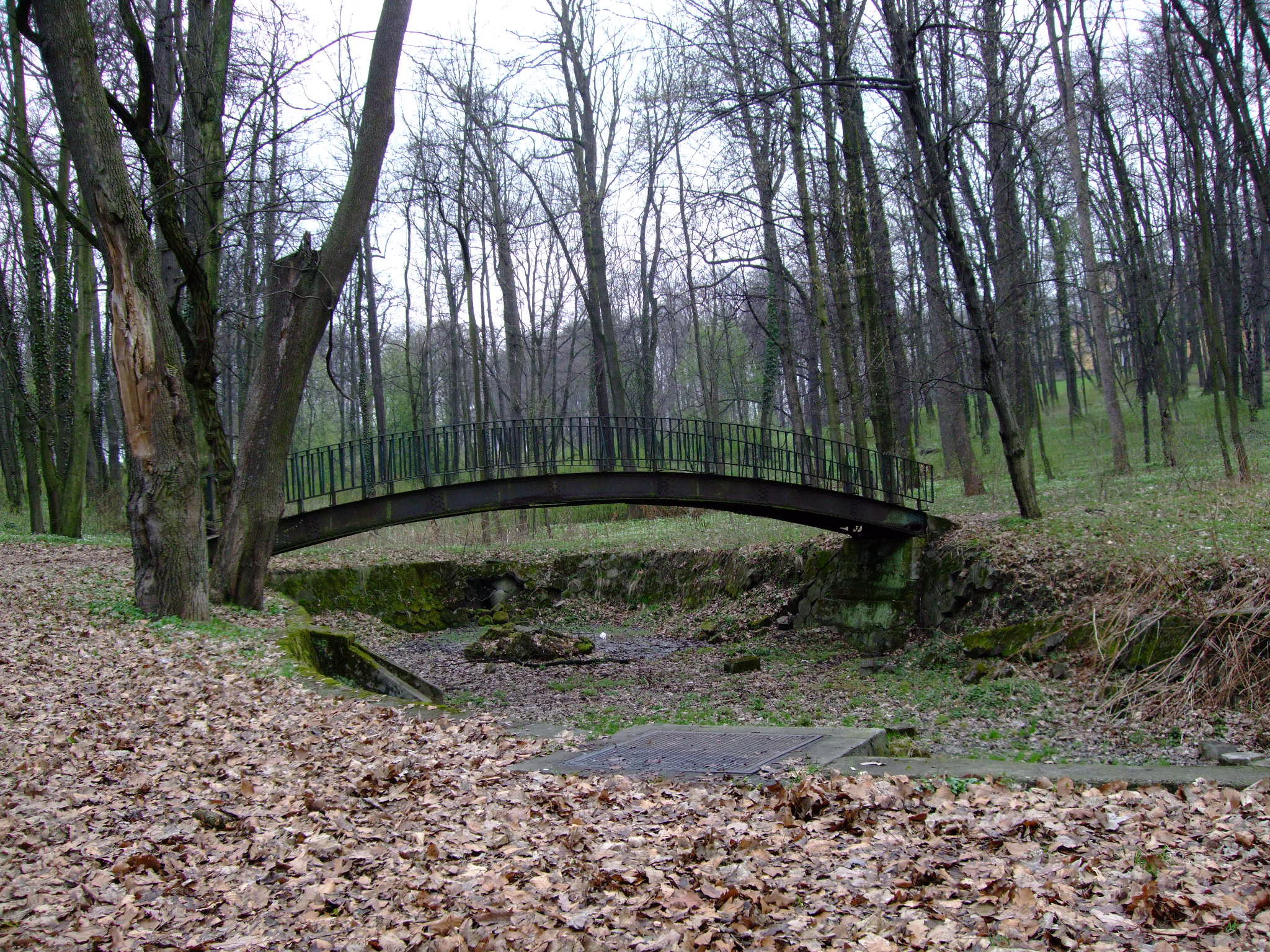 Mostek w parku, obok Pałacu Potockich w Krzeszowicach.